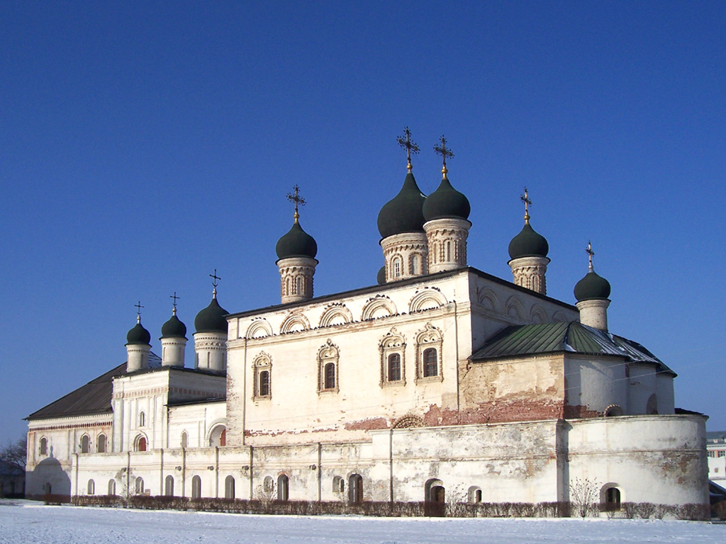 Троицкий собор в Астраханском кремле (16—18 в.)